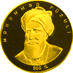 1996-cı ildə ilk dəfə olaraq Milli Bank tərəfindən Azərbaycanın görkəmli şair və mütəfəkkiri Məhəmməd Füzulinin həyat və yaradıcılığının (1494-1556) 500 illiyinə həsr olunmuş 100 manat dəyərində qızıl xatirə sikkəsi buraxılmışdır.